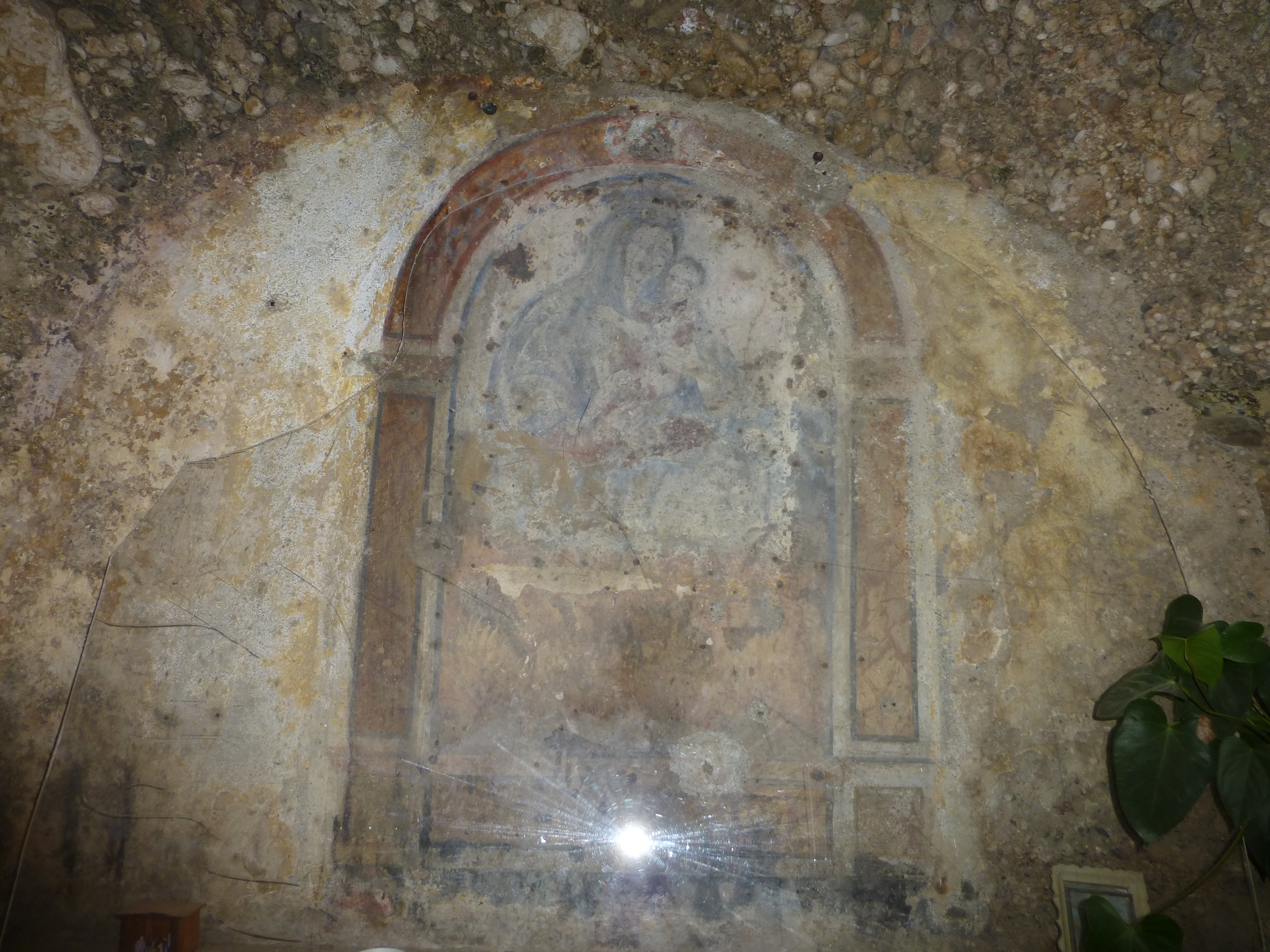 Icona della Beata Vergine Maria del Monte Carmelo in località Carcareda - Pazzano (RC)